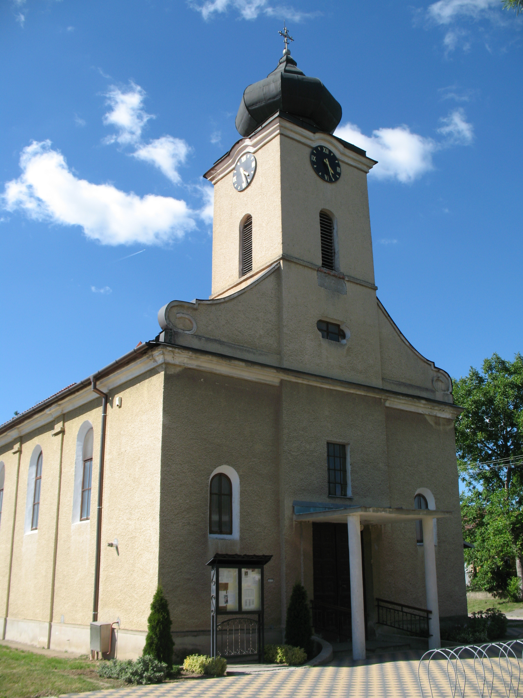 Décskelecsény